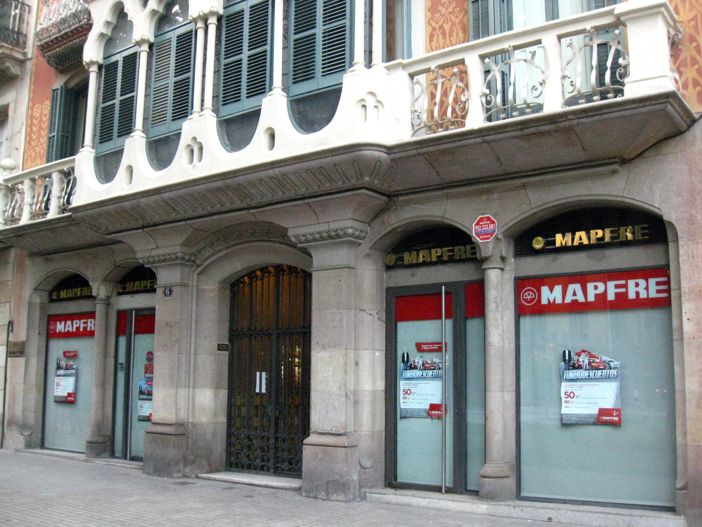 Casa Estapé (Barcelona) Object location41° 23′ 30.77″ N, 2° 10′ 47.8″ E The above coordinates are missing from linked Wikidata item M28056669. Click here to copy it